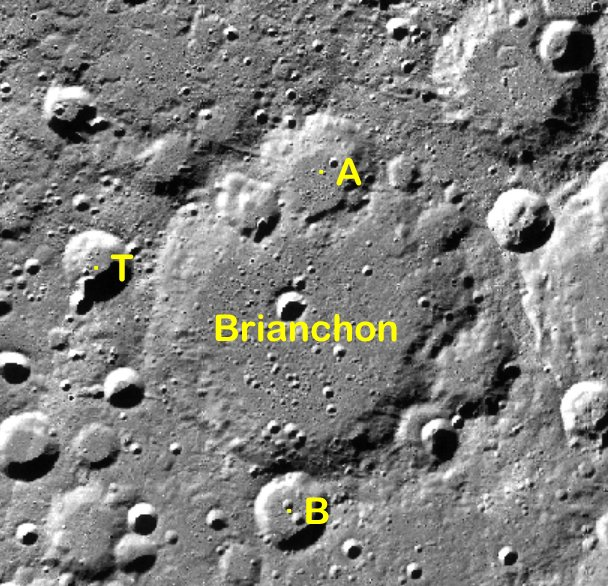 Cráter lunar Brianchon. Cráteres satélite. (Imagen LRO)